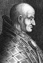 Immagine tratta da